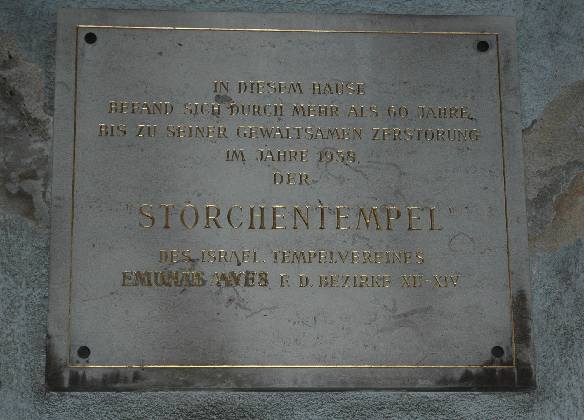 ehemalige Storchenschul in Wien XV. (Rudolfsheim-Fünfhaus), ab 1873 jüdisches Vereinshaus, ab 1930 Synagoge; 1938 verwüstet und ab 1939 enteignet; 1952 an IKG Wien zurückgestellt, 1955-1974 Heimat der Hashomer Hatzair, später an Baugesellschaft verkauft